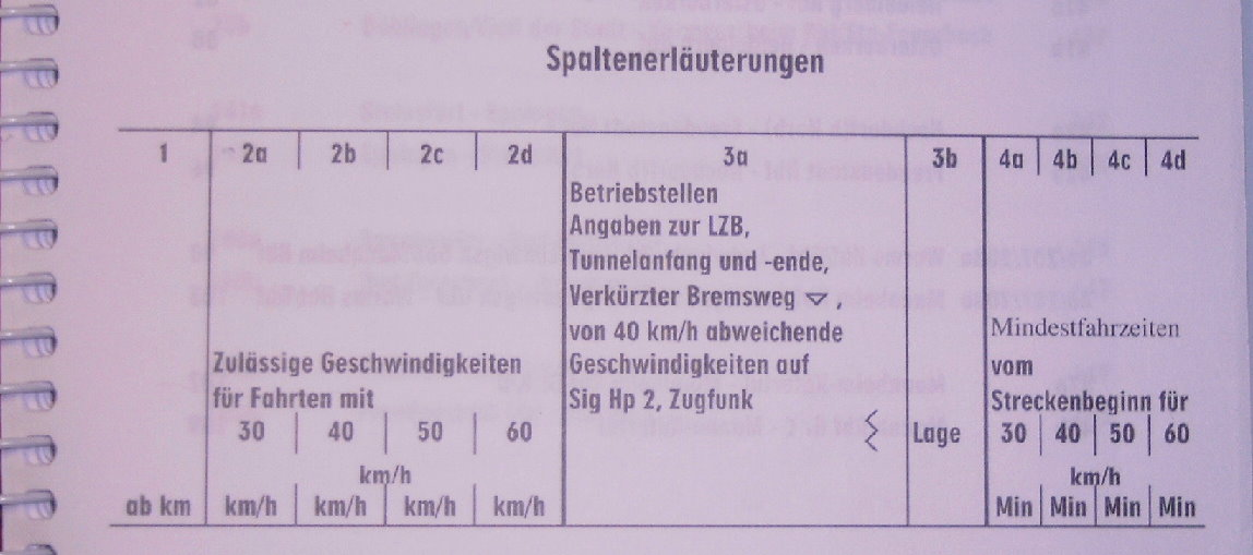 Spaltenerklärung des Ersatzfahrplanes